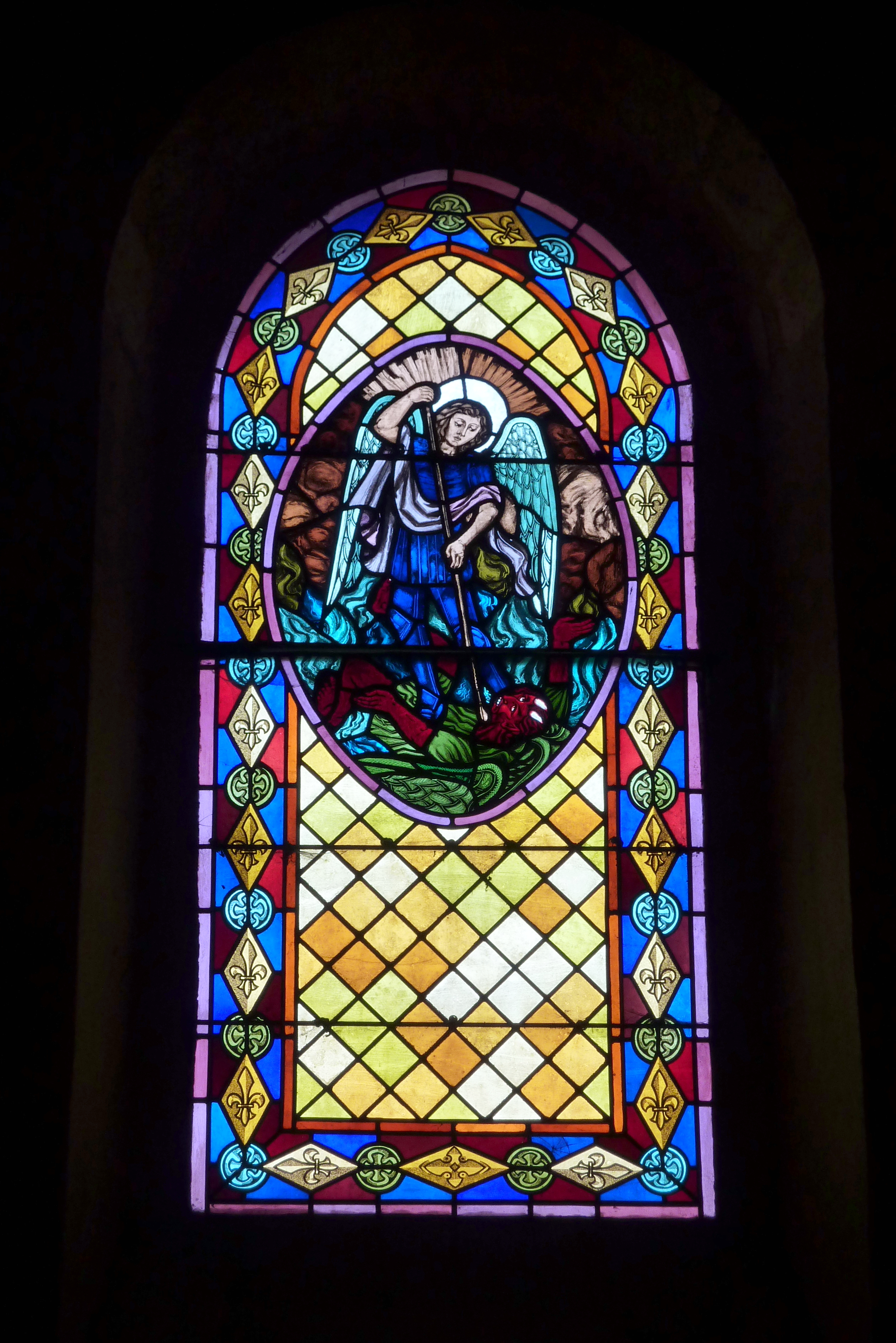 Bleiglasfenster in der Kirche Saint-Nicolas in Villennes-sur-Seine, Darstellung: hl. Michael